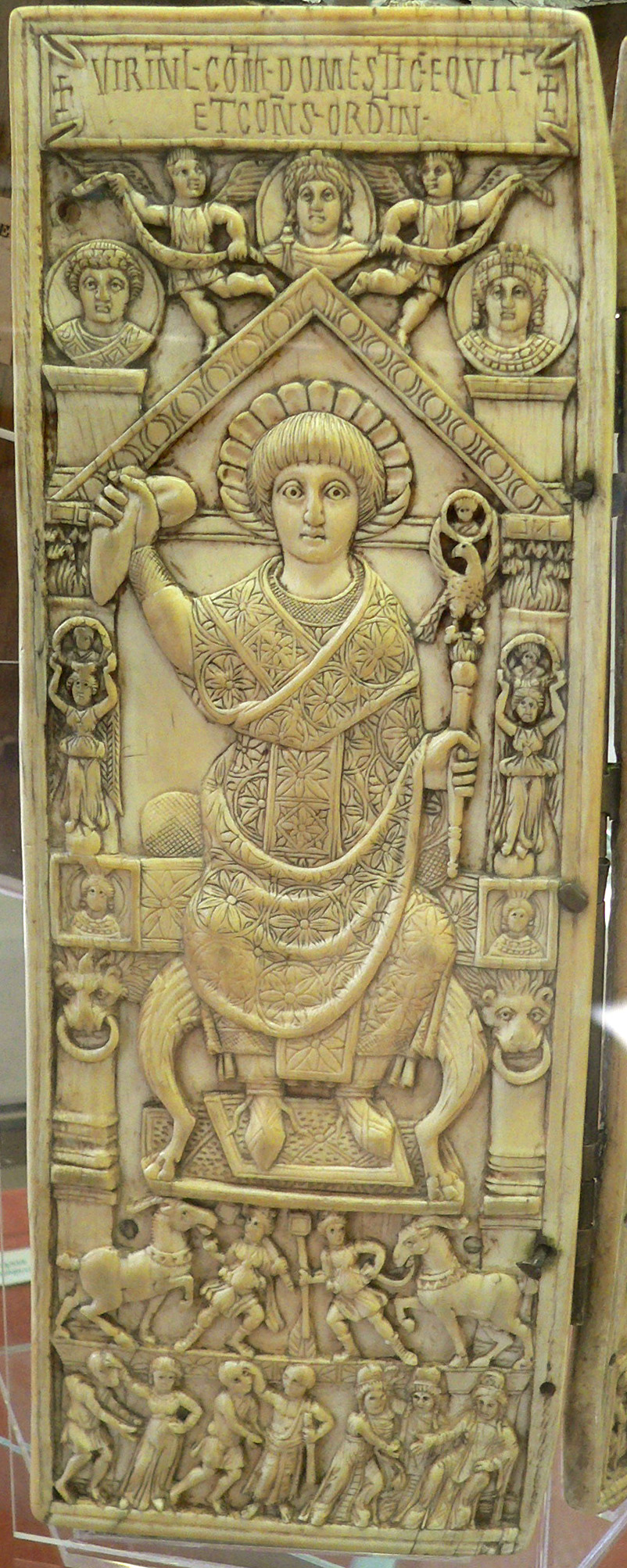 Diptyque de Flavius Anastasius Probus Diptyque, feuillet gauche. Consul en 517, Constantinople, Ivoire d'éléphant, Ancien trésor de Saint-Etienne de Bourges.